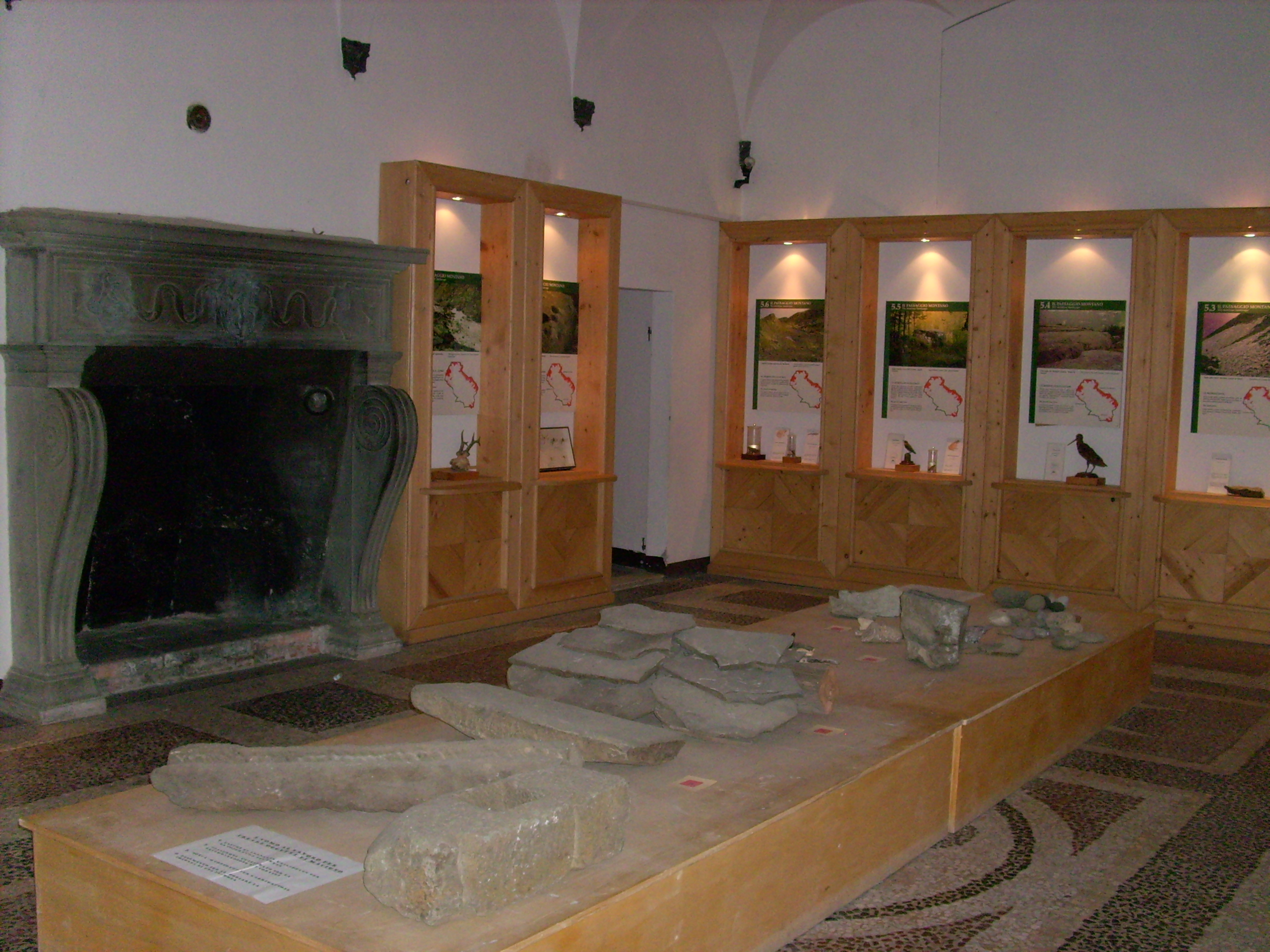 Museo di Storia Naturale della Lunigiana presso la fortezza della Brunella ad Aulla, Toscana, Italia